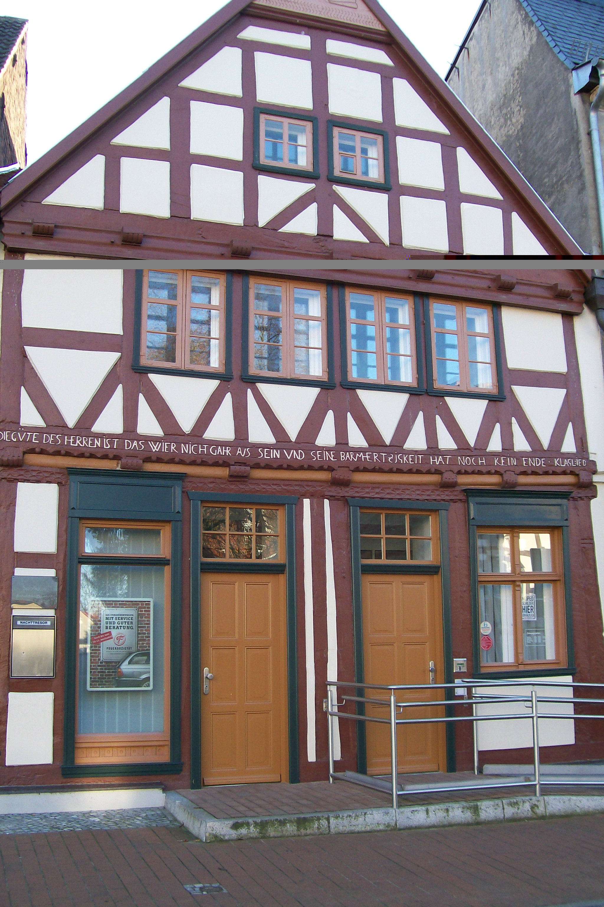 Gebäude Große Straße 27 in Bad Wilsnack, Brandenburg), erbaut 1692. Das Gebäude steht unter Denkmalschutz.